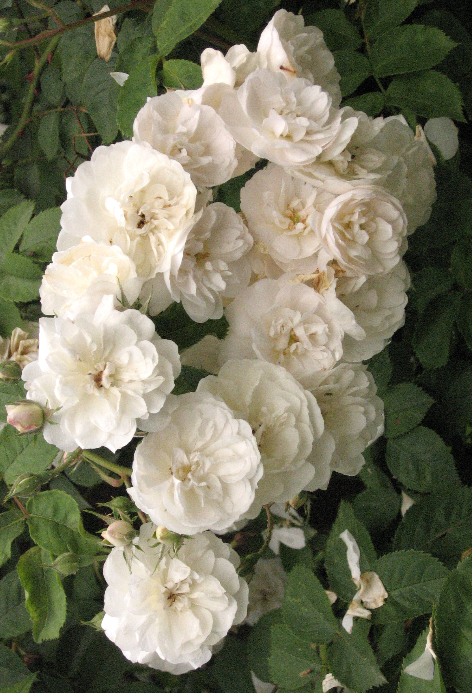 Rosa 'Dundee Rambler', gr. Arvensis, sect. Synstylae. Real Jardín Botánico, Madrid